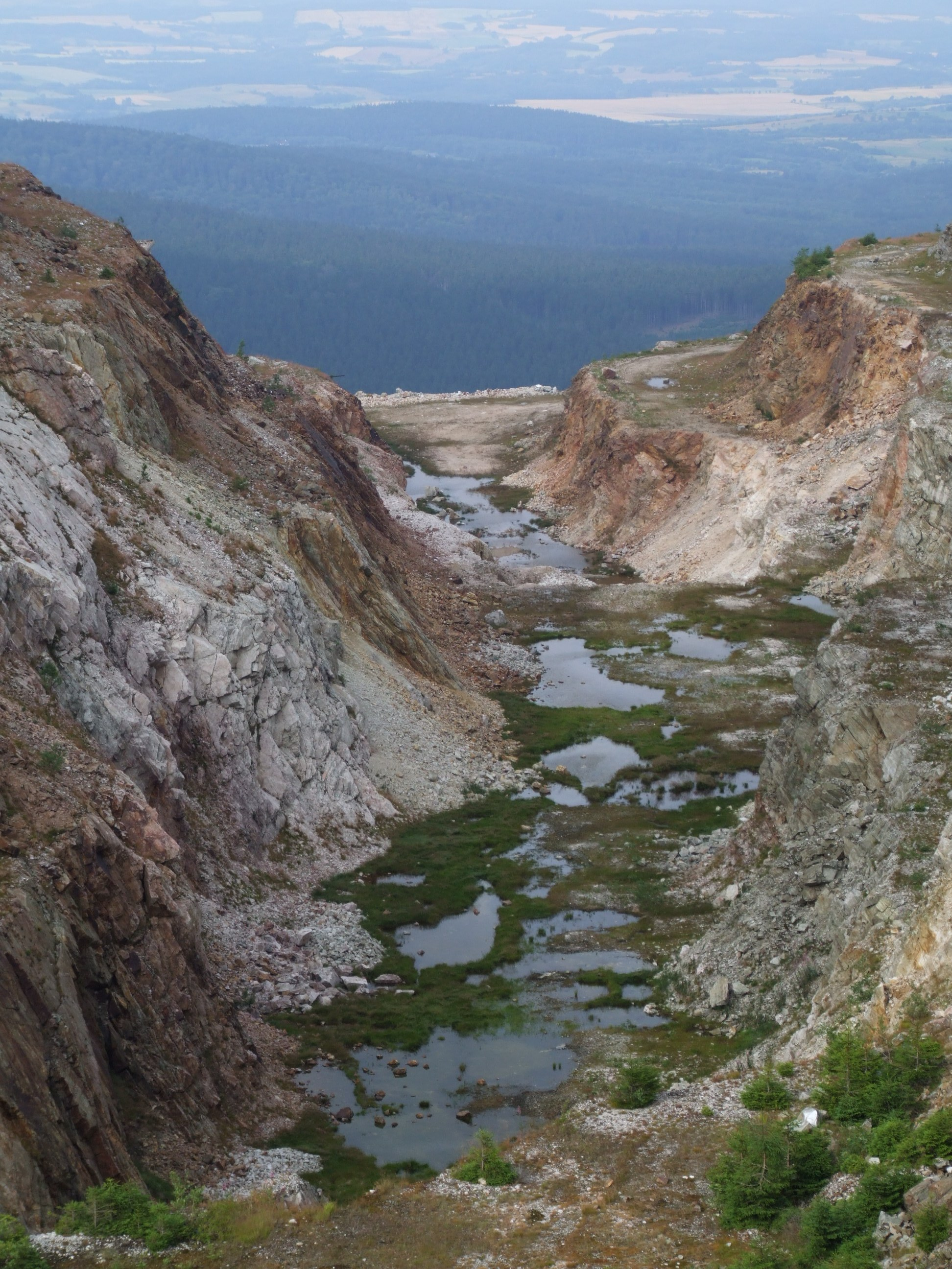 Wyrobisko w kopalni kwarcu Stanisław - Góry Izerskie